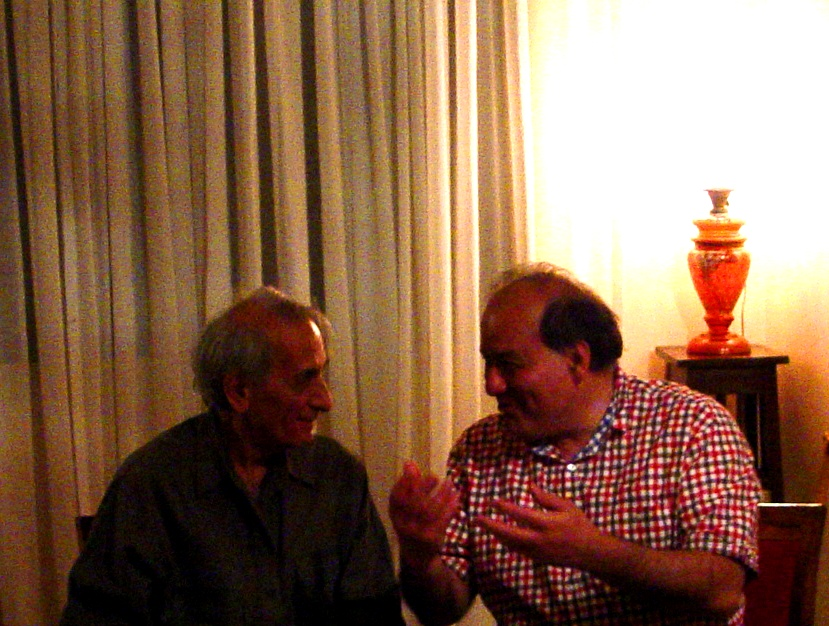 ناصر فکوهی در کنار اسطوره شناس ستار جلالی